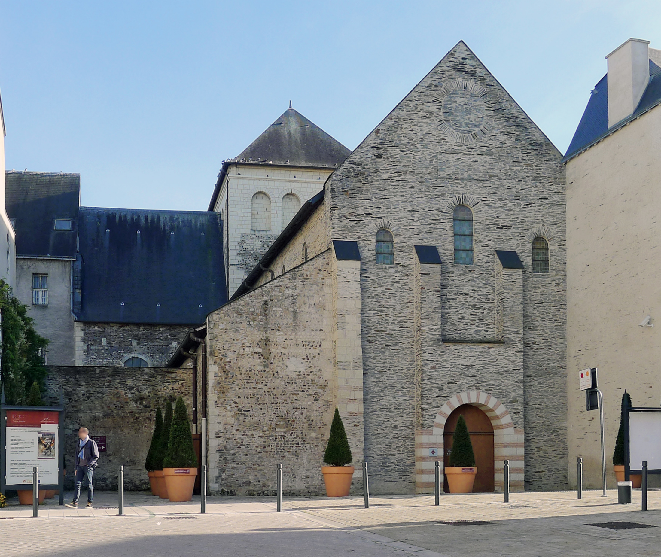 Collégiale Saint-Martin d'Angers - (Maine-et-Loire, France) It is indexed in the Base Mérimée, a database of architectural heritage maintained by the French Ministry of Culture, under the references IA49000804 and PA00108908 .